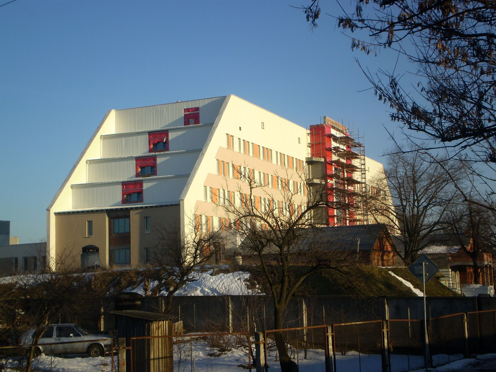 Будучая дзіцячая паліклініка